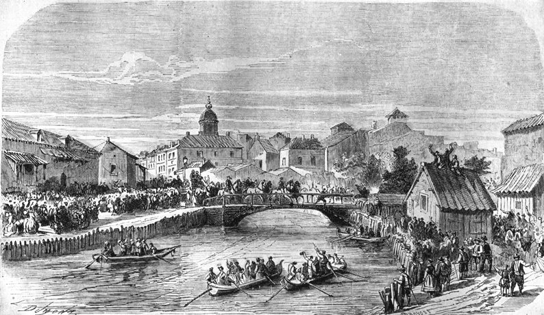 gravure labeled "Entrée à Bucharest du Prince Charles de Hohenzollern, sur le pont de la Dumbovitz" Entering of Carol I in Bucharest, 10 May 1866